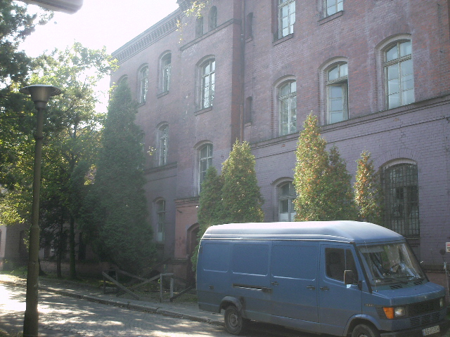 Gliwice - budynek przy ul. Bolesława Śmiałego